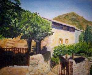 Maison de Laroque-de-Fa, propriété du poète Raymond Busquet et de son épouse Jacqueline.